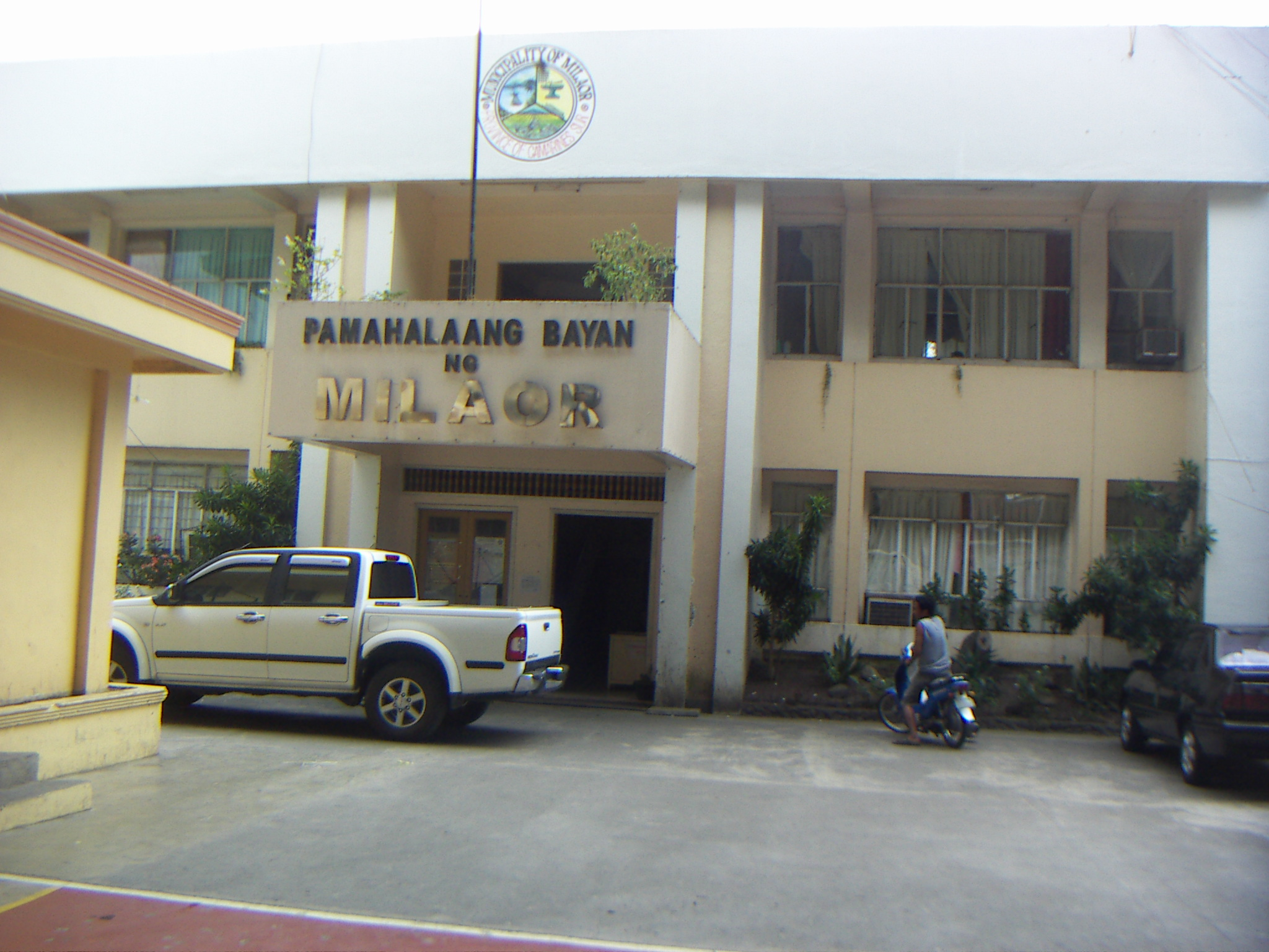 Milaor, Camarines Sur, Philippines